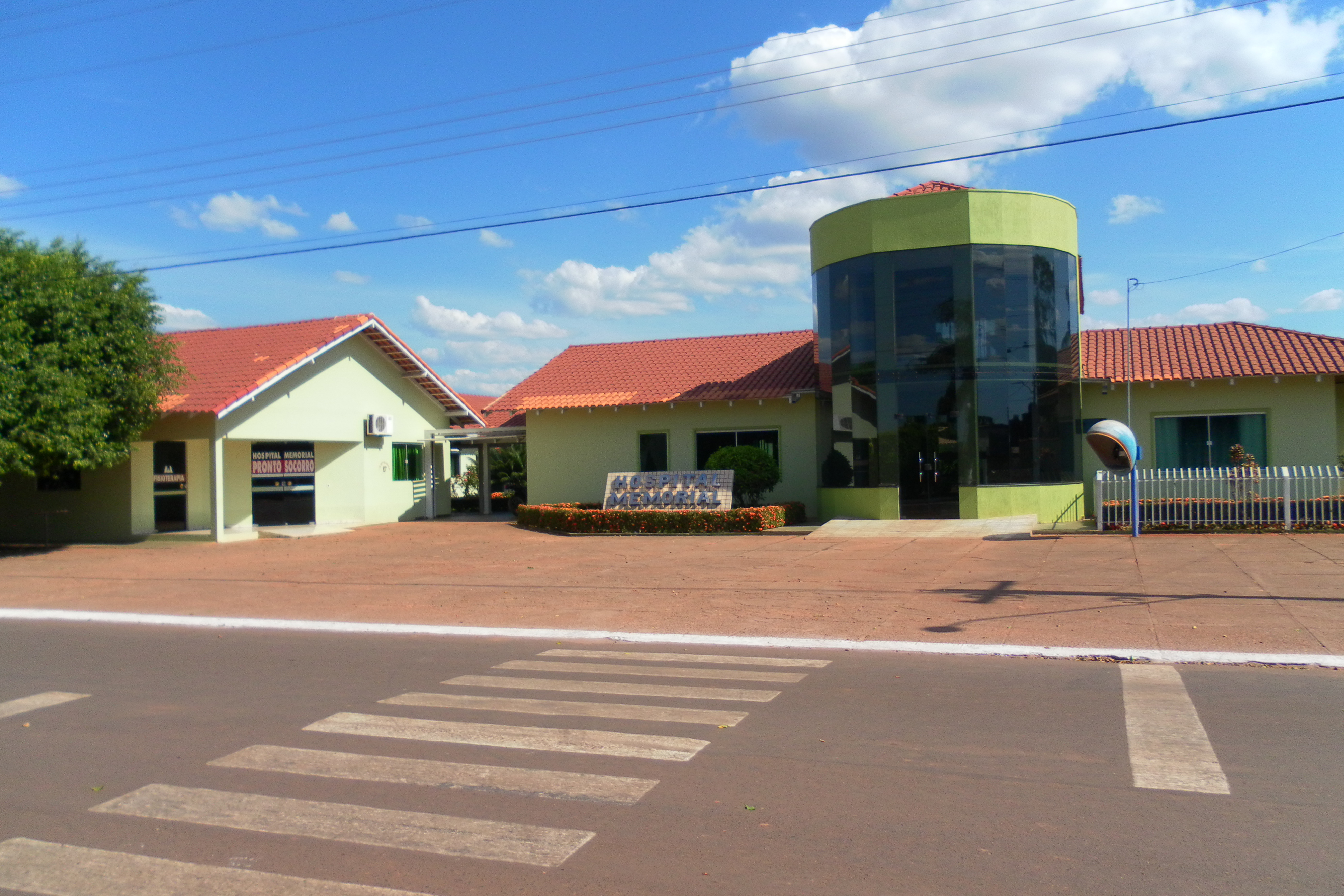 Hospital Memorial de Espigão do Oeste, RO.